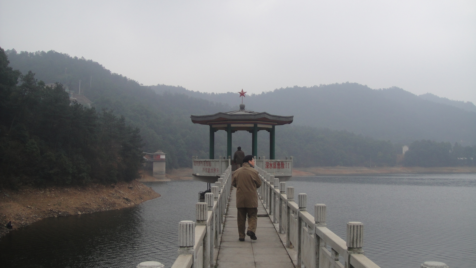 中文（中国大陆）: 湖南韶山的青年水库 1950年代末建设吴语: 湖南省韶山市个青年水库